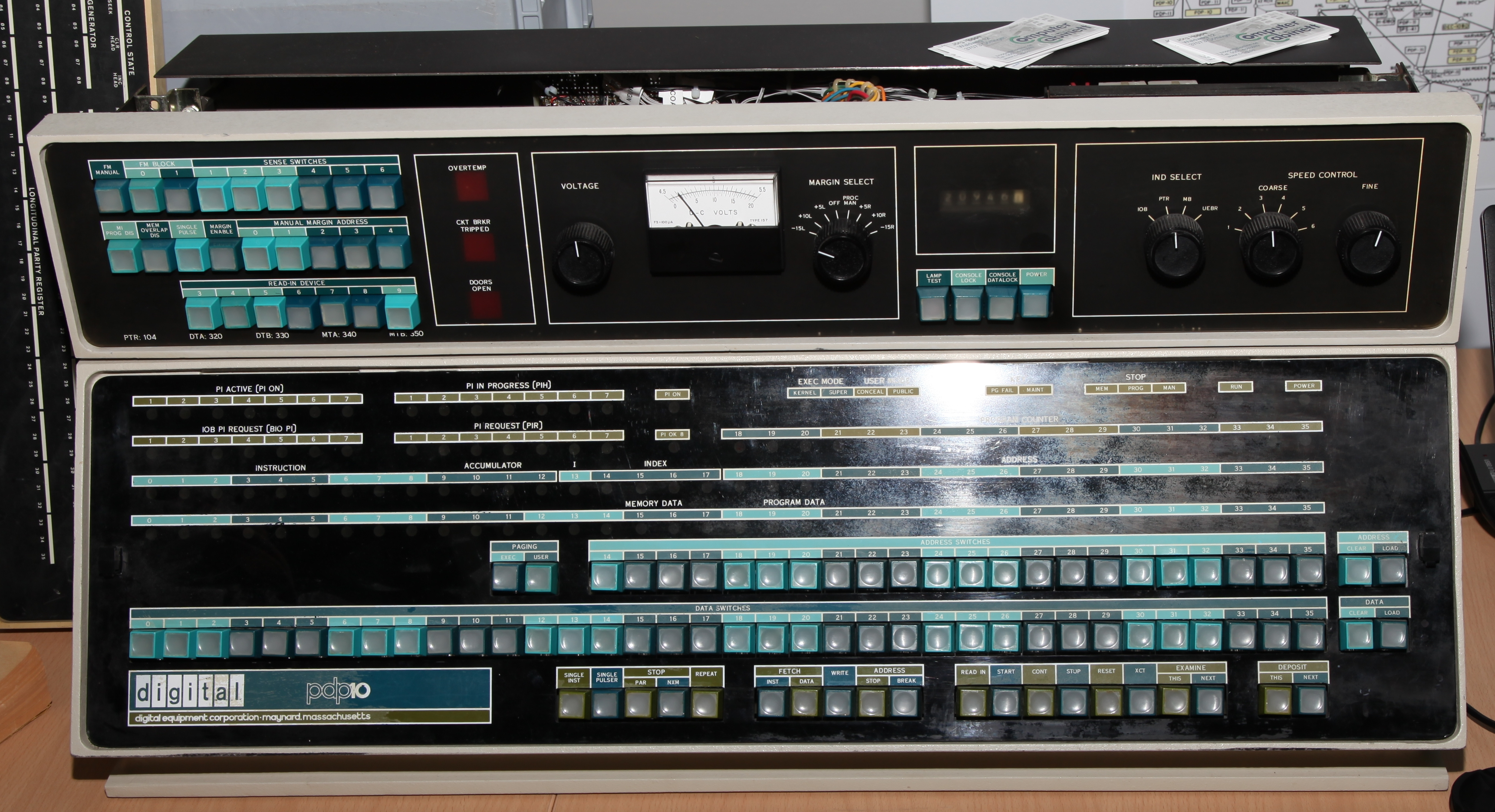 Digital PDP-10 Konsole